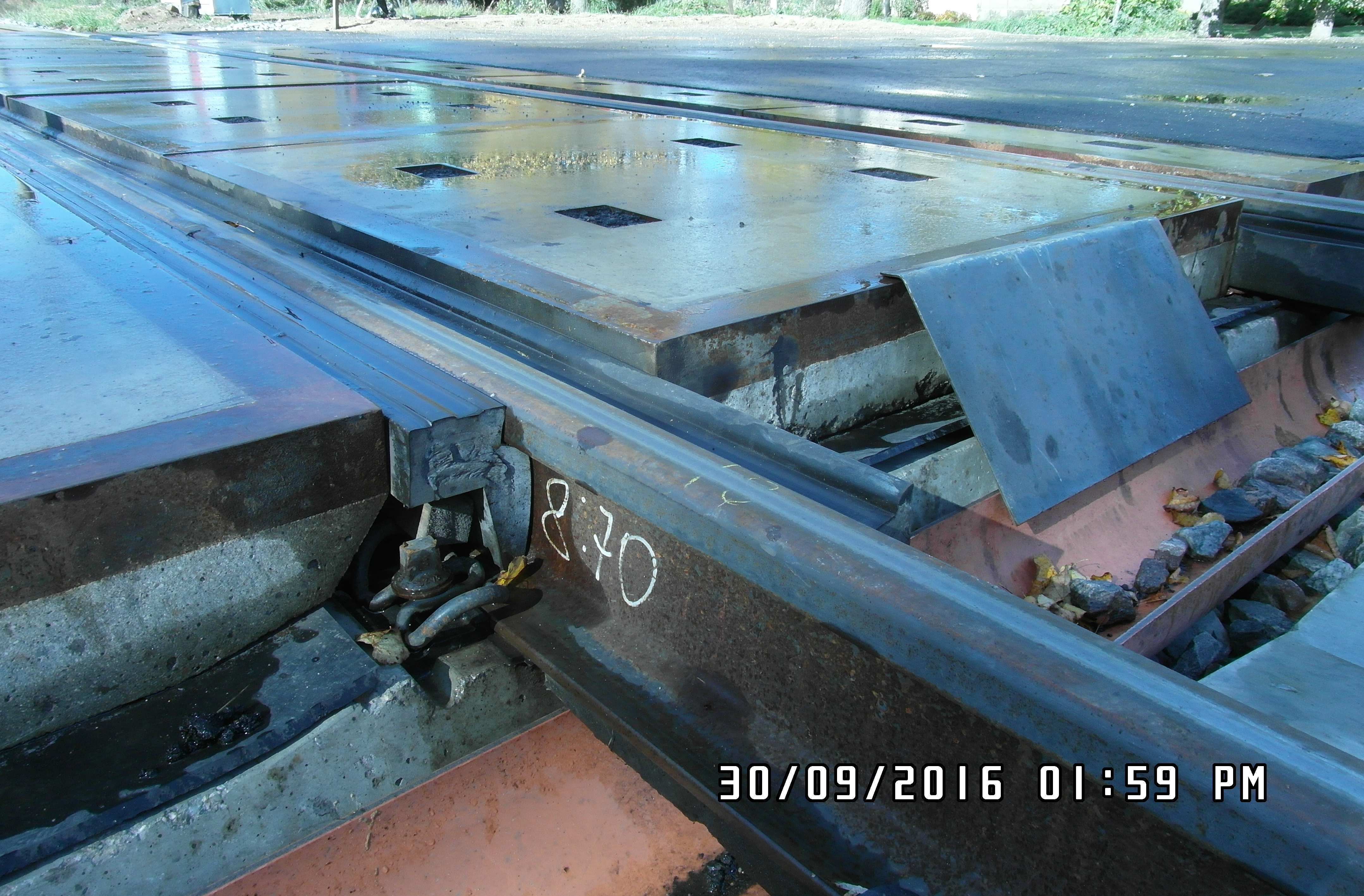 Pārbrauktuves klājs